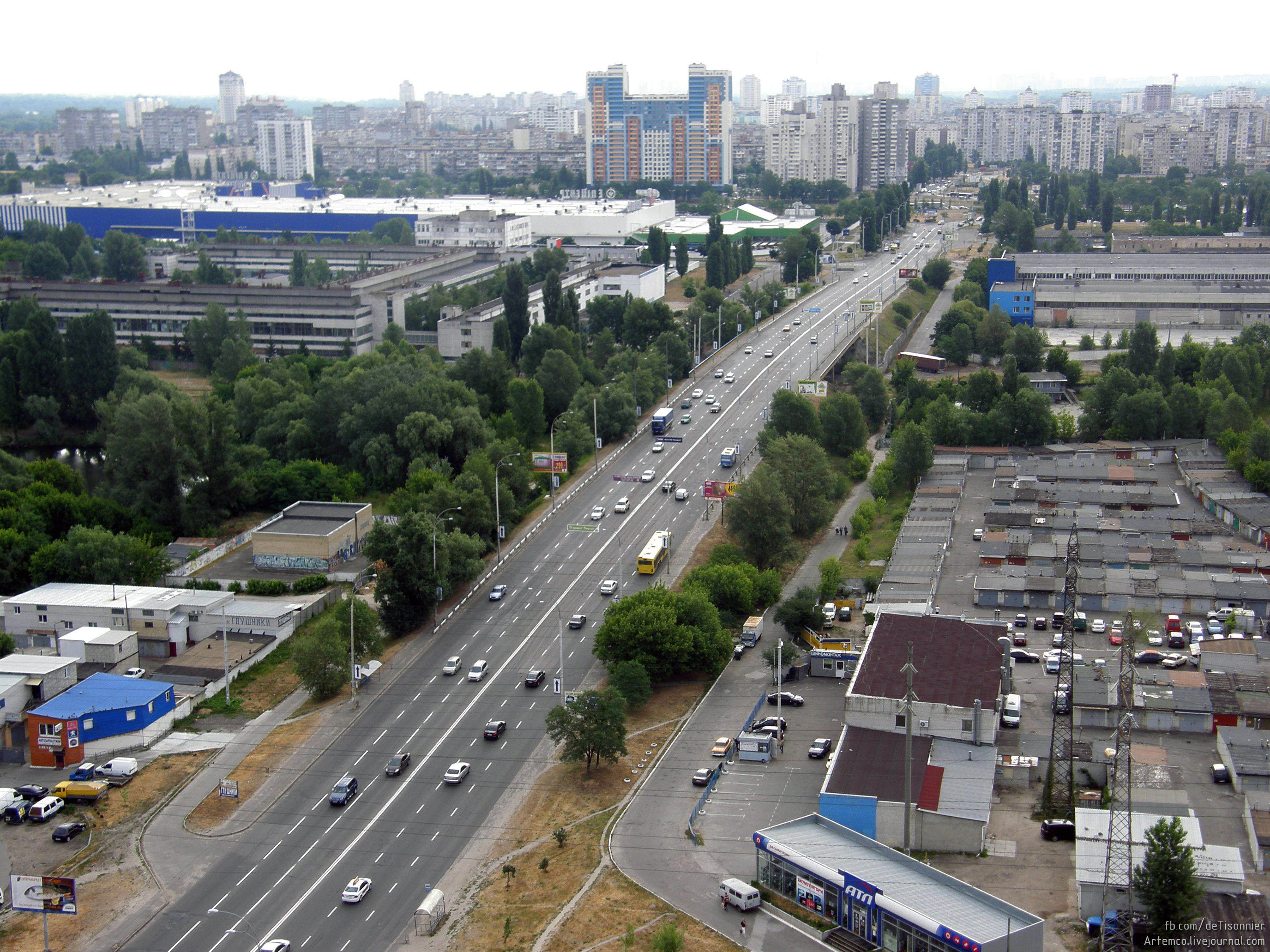 улица Полярная